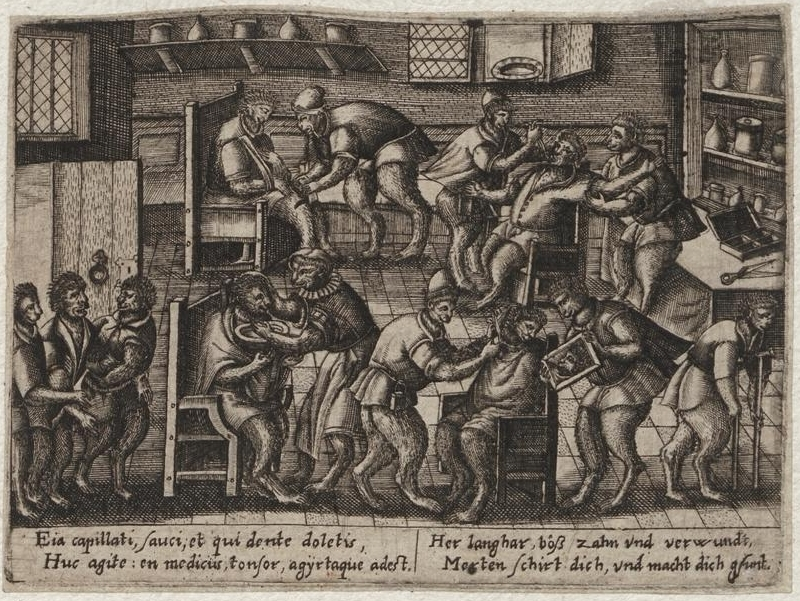 Grafik aus dem Klebeband Nr. 18 der Fürstlich Waldeckschen Hofbibliothek Arolsen Motiv: Barbiere, Dentisten, Wundärzte Eia capillati, sauci, qui dente doletis, Huc agite: en mediciis, tonsor, agyrtaque adest Her langhar, böß zahn und verwundt Morten schirt dich, und macht dich gsunt.